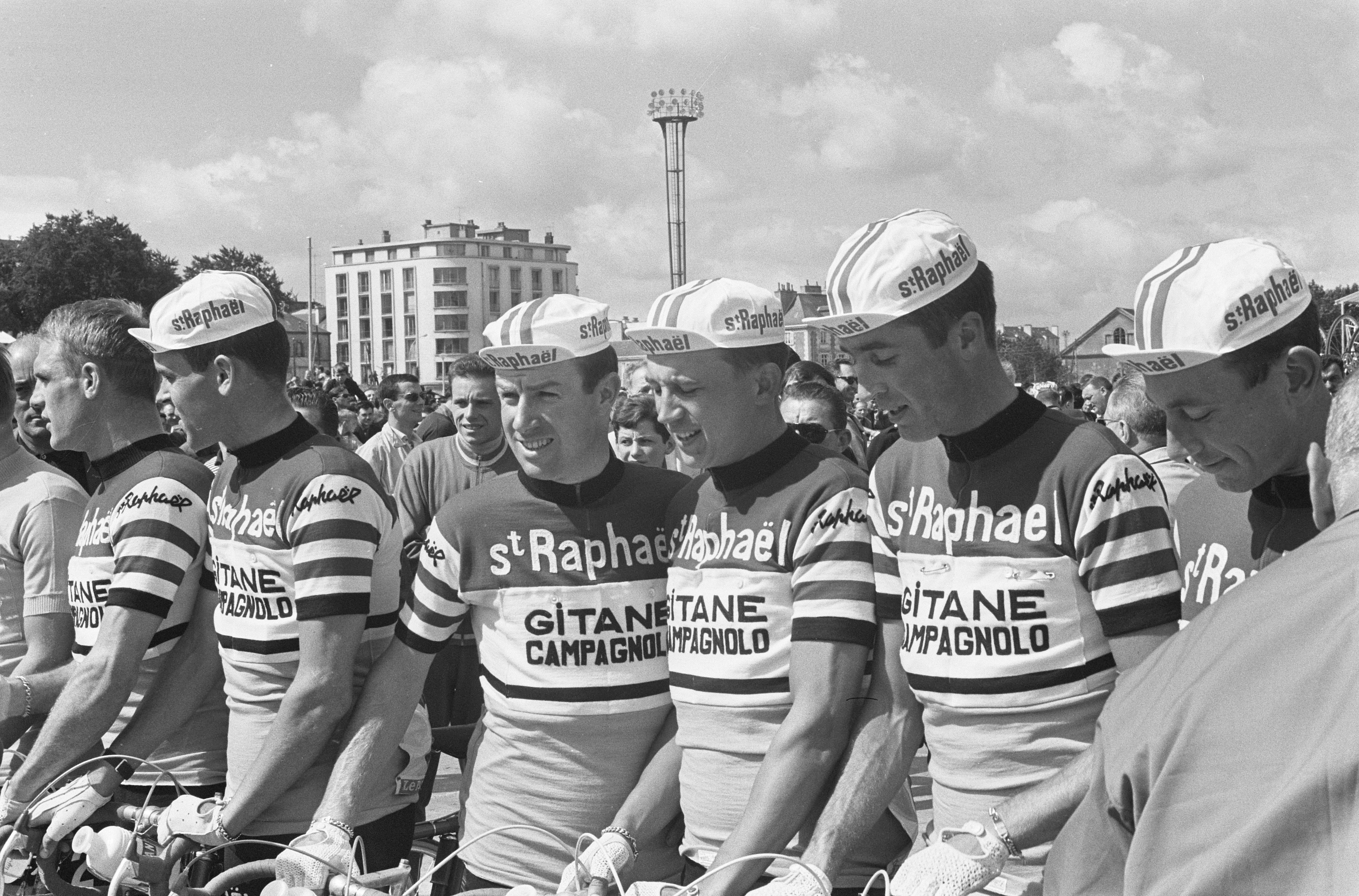 Nationaal Archief Beschrijving: De St. Raphael-Gitanes ploeg. vlnr: Anquetil (gele trui, gedeeltelijk) Altig Rudi De Roo Elliott Everaert Geldermans Lebaube Datum: 24 juni 1964 Bestanddeelnummer 916-5778 Vervaardiger: Anefo / Harry Pot (1929–1996) DescriptionDutch photographer and cinematographerDate of birth/death 1929 1996Work location Amsterdam, BentveldAuthority control : Q27877051 VIAF: 284191334 ISNI: 0000 0003 9050 874X Koninklijke: 073478326 creator QS:P170,Q27877051 URL: [1] Voor meer informatie over het Nationaal Archief: Voor meer foto's uit deze en andere collecties, bezoek onze Beeldbank:, U kunt ons helpen onze kennis van de fotocollecties te verrijken door tags en commentaren toe te voegen. Herkent u mensen of locaties of heeft u een bijzonder verhaal te vertellen bij één van de foto's, laat dan een reactie achter (als u ingelogd bent bij Flickr) of stuur een mailtje naar